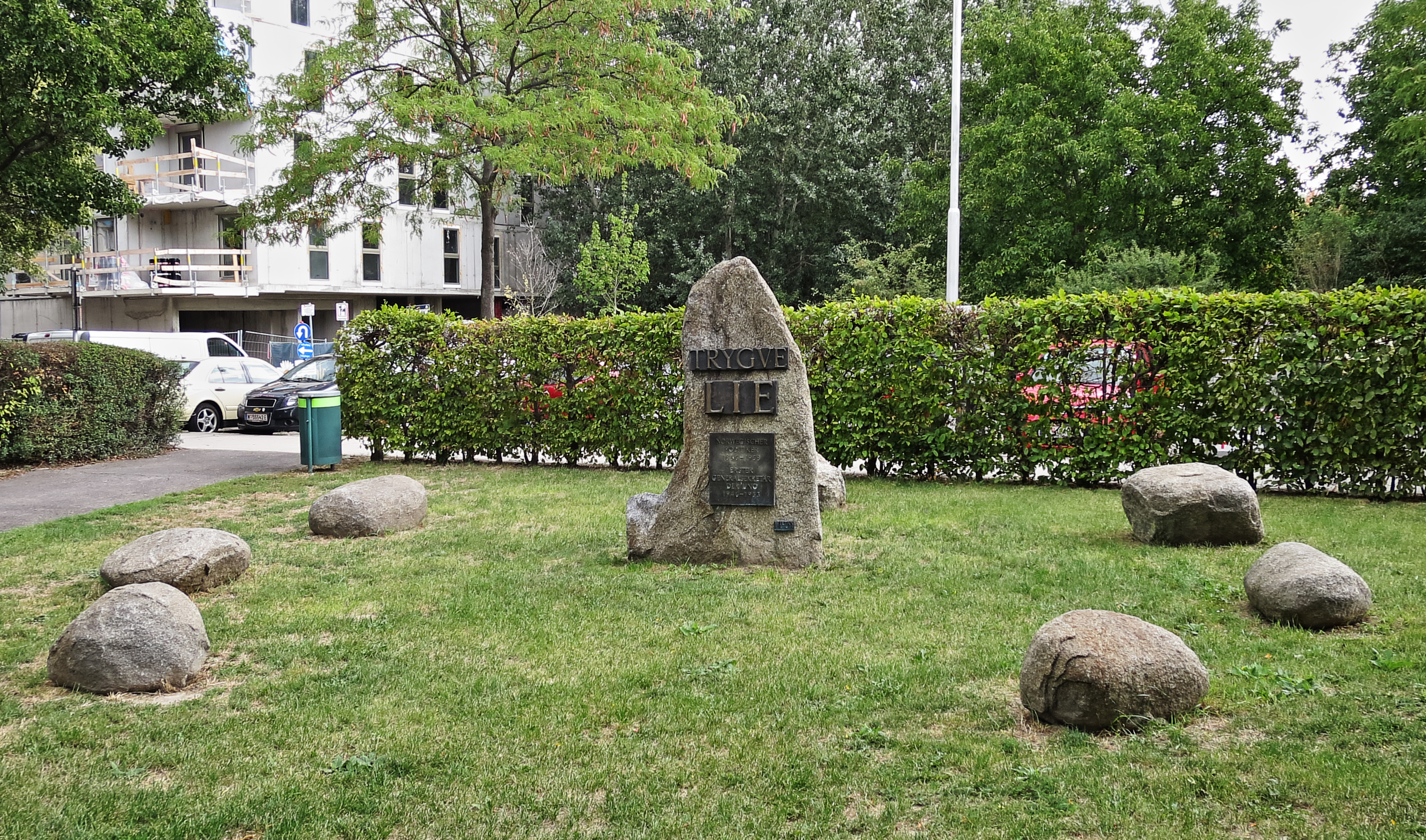 Wien-Donaustadt, Trygve-Lie-Park, Denkmal